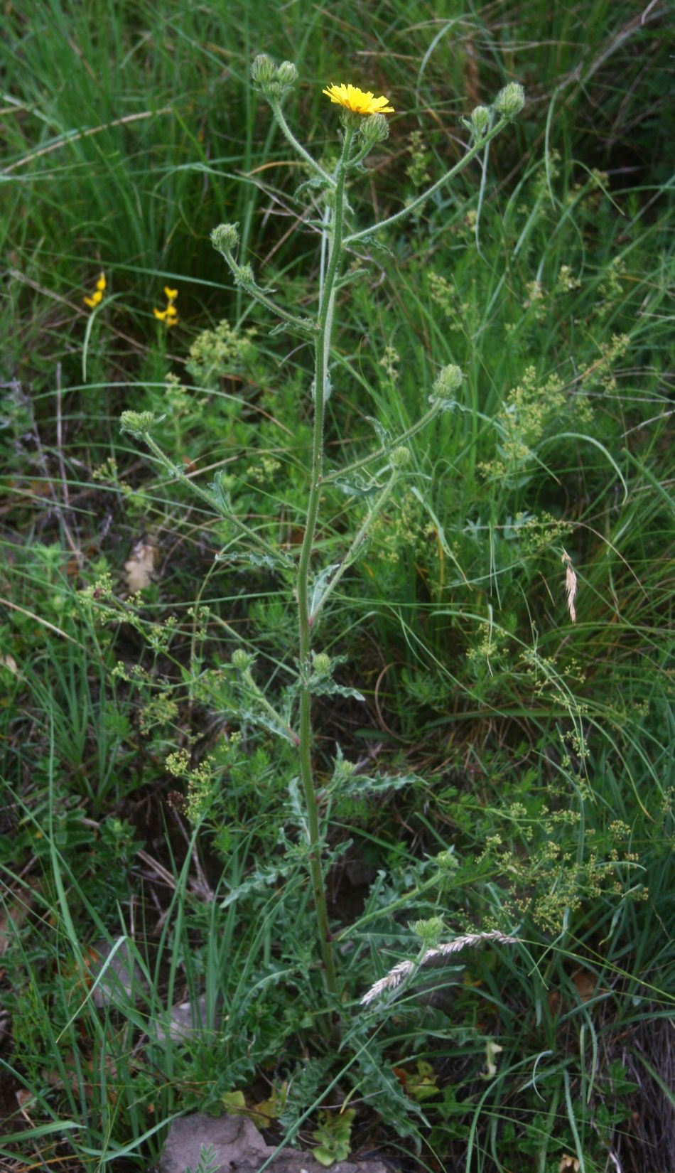 Borsten-Pippau (Crepis setosa), Korbblütler (Asteraceae) - Slowenien/Slovenija/Slovenia: Primorska, an der Straße ca. 2,5 km NW Podgorje